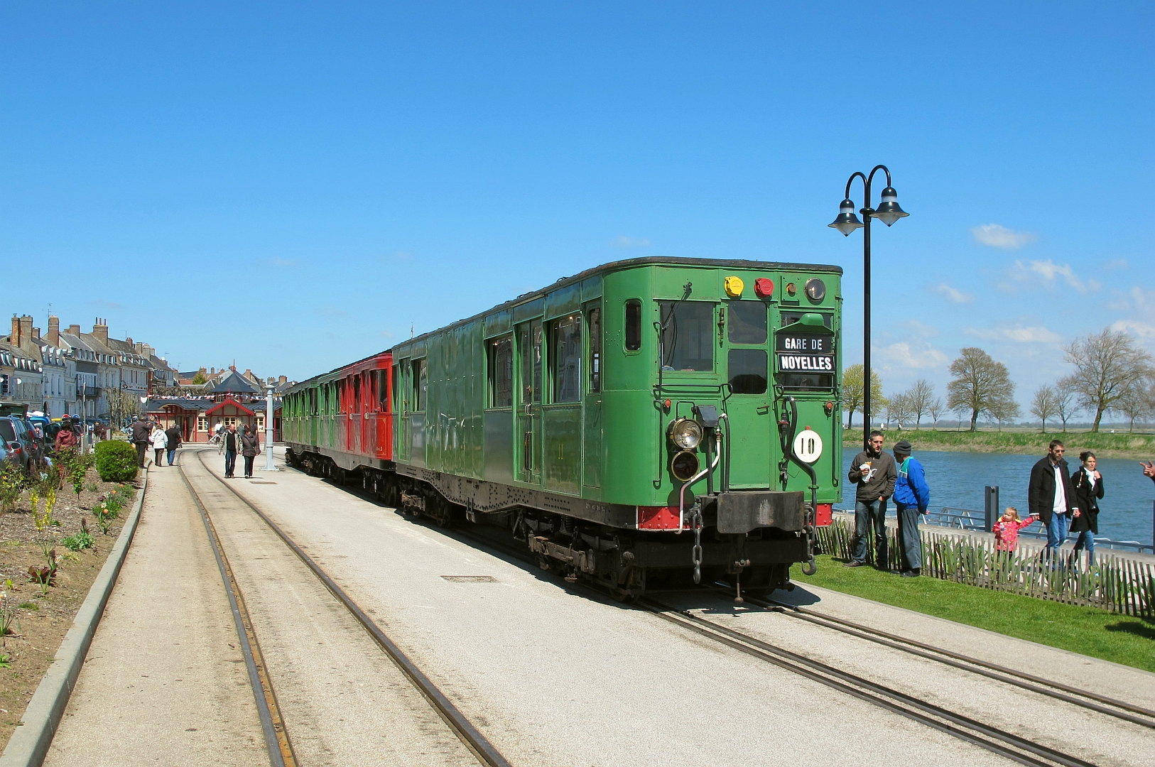 La rame de métro Sprague de L'ADEMAS, en gare de Saint-Valery-Port sur le chemin de fer de la baie de Somme le 28 avril 2013.